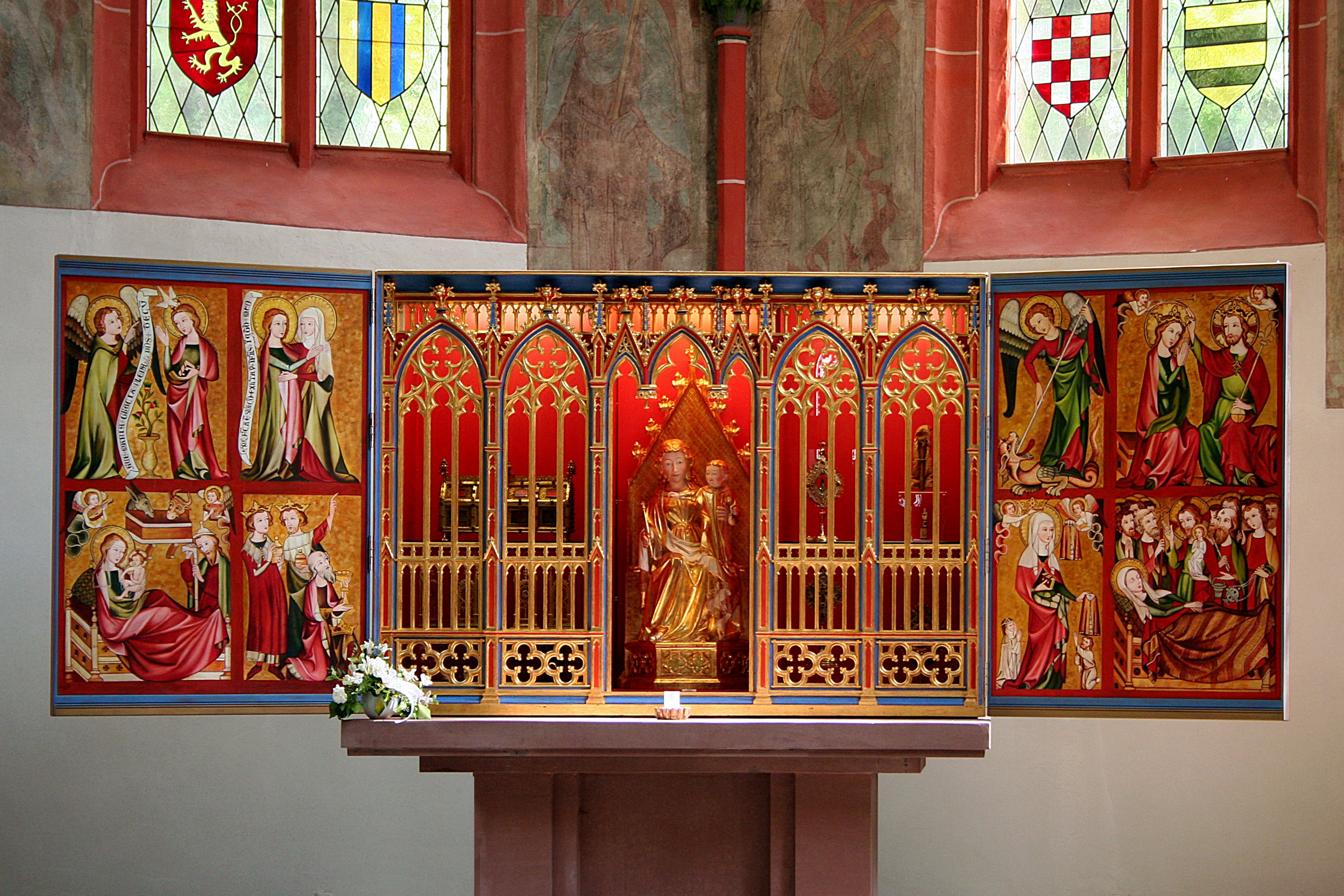 Abteikirche Sayn, Hochaltar; Rekonstruktion des Reliquienaltars des ehemaligen Prämonstratenserinnenklosters Altenberg bei Wetzlar aus dem frühen 14. Jahrhundert